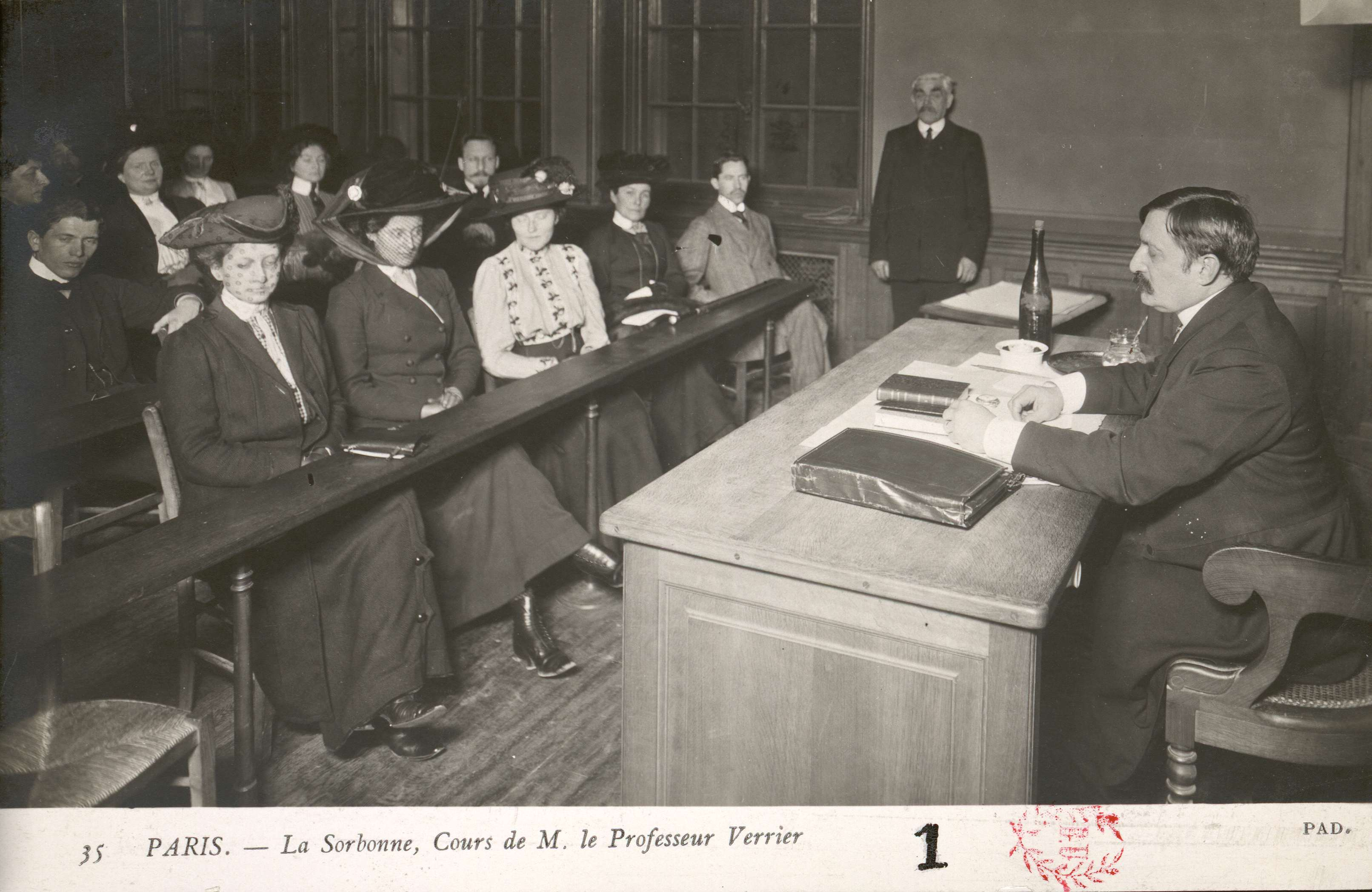 Carte postale